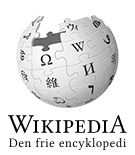 Wikipedia logo 2.0 (no)